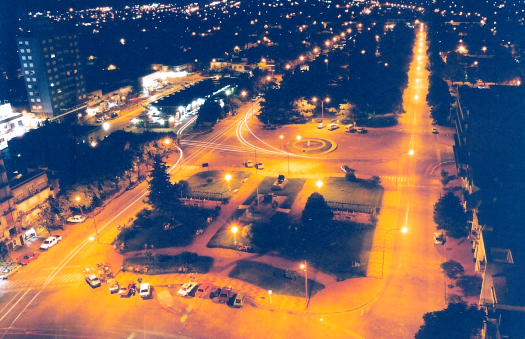 Avenida San Martín vista desde la terraza de la Torre San Martín, en la esquina de Sáenz Peña. En primer plano, la Plaza Fuerzas Armadas, antes de las reformas de 2005. Junín, Argentina.